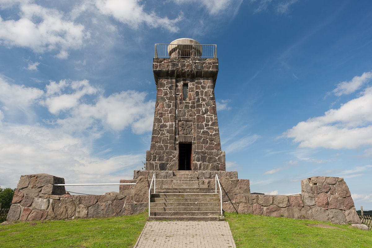 Bismarcksäule auf dem Pariner Berg nähe Bad Schwartau